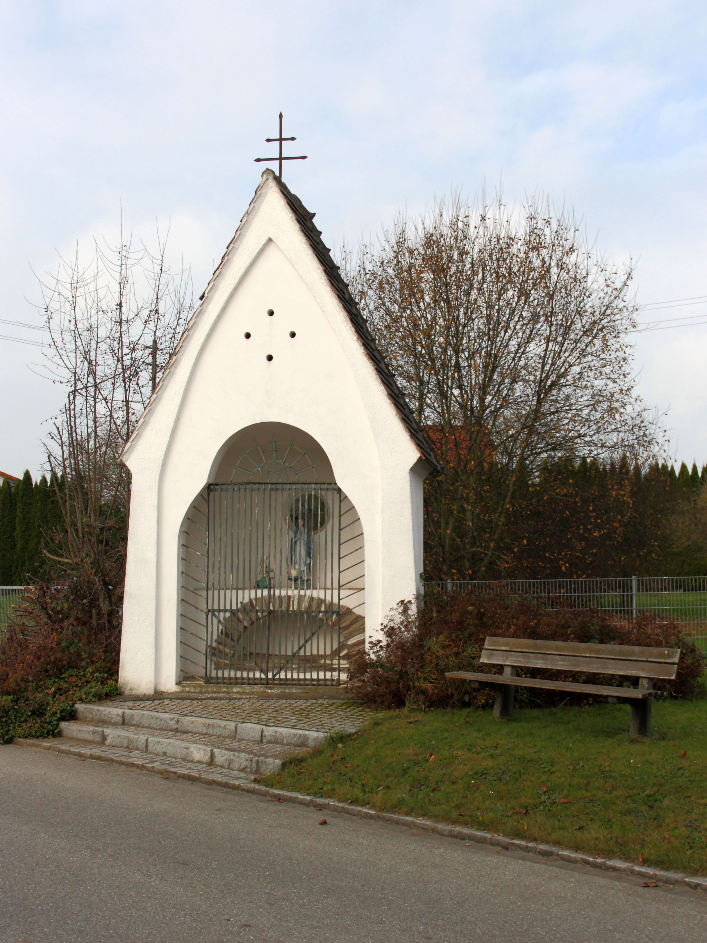 Wegkapelle an der Inneberger Straße in Dietershofen